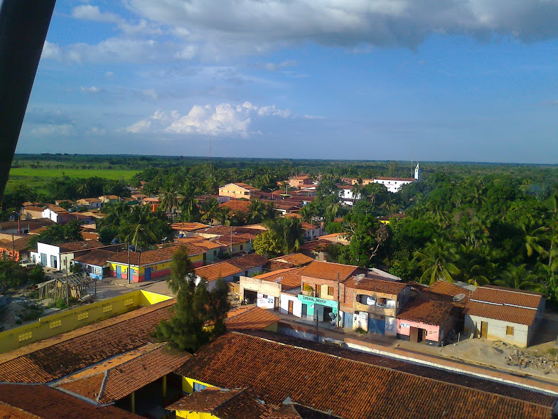 Imagem panorâmica de Centro do Guilherme